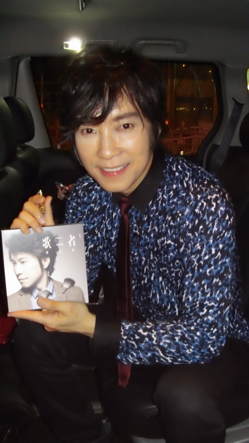 中文（香港）: 邰正宵的樣子